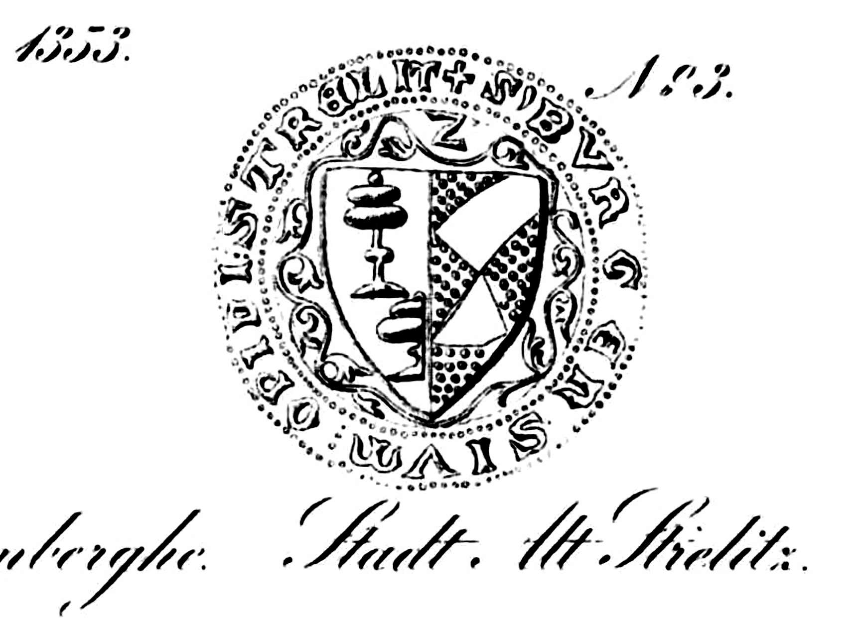 "Das Stadtwappen von Alt-Strelitz zeigt im Schilde das vereinte von Dewitsche und das Gräflich Fürstenbergsche Wappen. Es hat links, von den drei dewitschen Bechern einen ganzen und einen halben, und rechts von dem genannten Schilde des gräflichen Wappens einen Teil aufgenommen und beide Bilder im gespaltenem Schilde verbunden. So war seine ursprüngliche Gestalt, in dem neuen Siegel von Alt-Strelitz ist der halbe Becher weggeblieben, und an die Stelle der Routen sind Fahnen getreten." [L. Wegner: „Familiengeschichte der von Dewitz“. (Digitalisat) Naugard 1868, S. 43.]